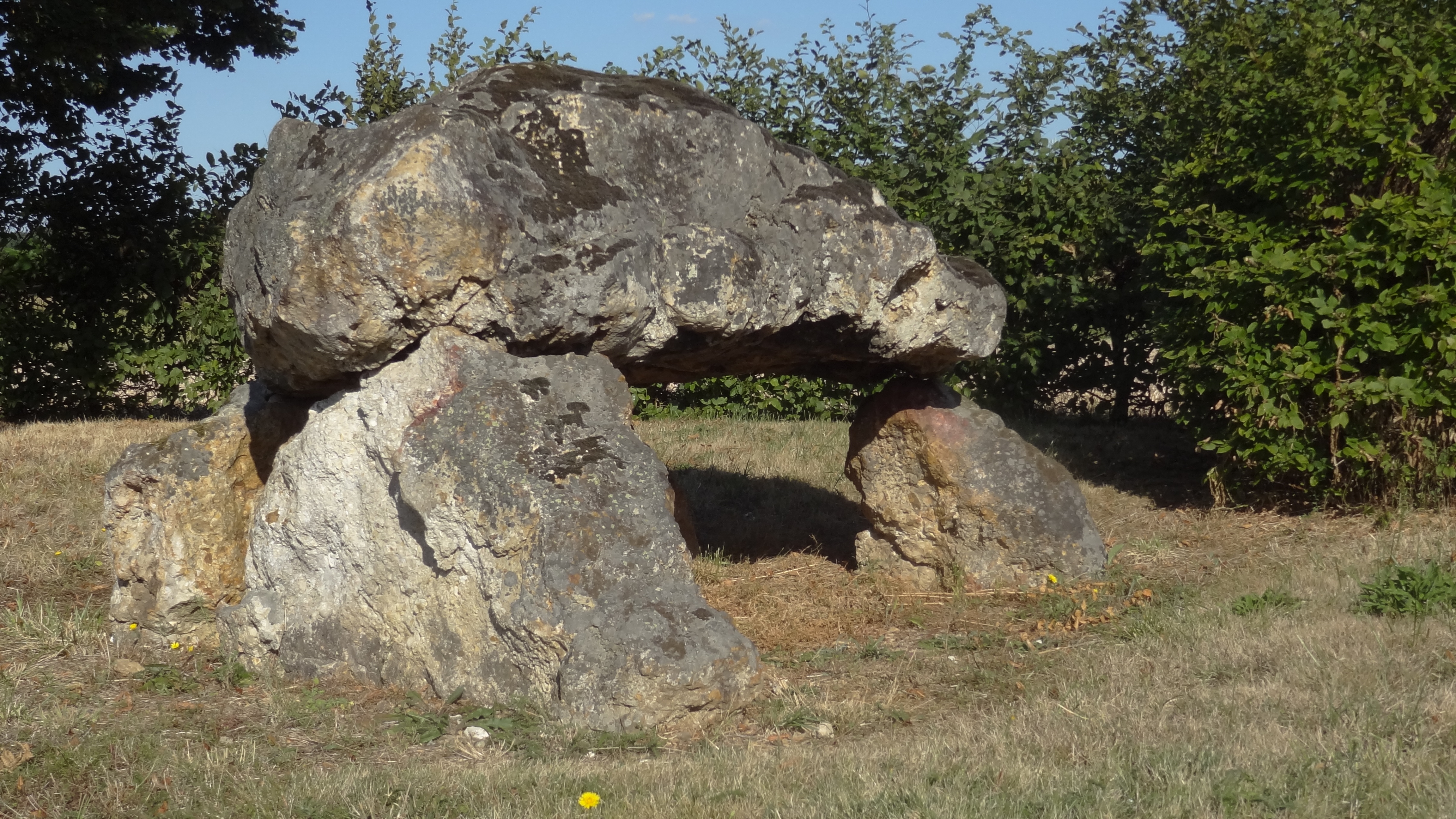 Dolmen de la Couture, Saint-Hilaire-la-Gravelle, Loir-et-Cher, France